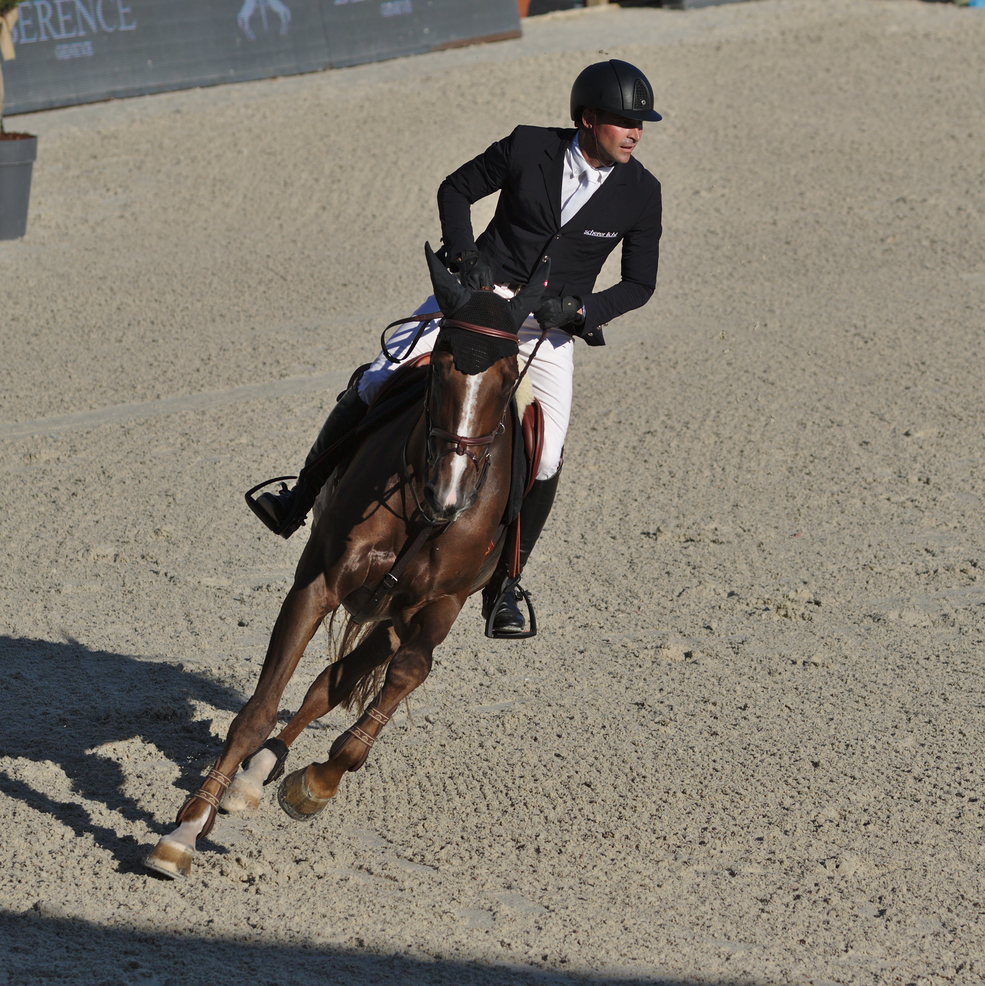 ILHS 2016 - 20160909 - Romain Duguet et Twentytwo des Biches